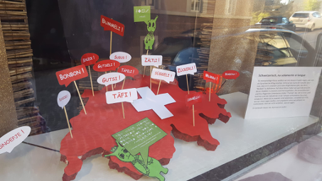 Gewinnerprojekt Sprachwettbewerb 2019